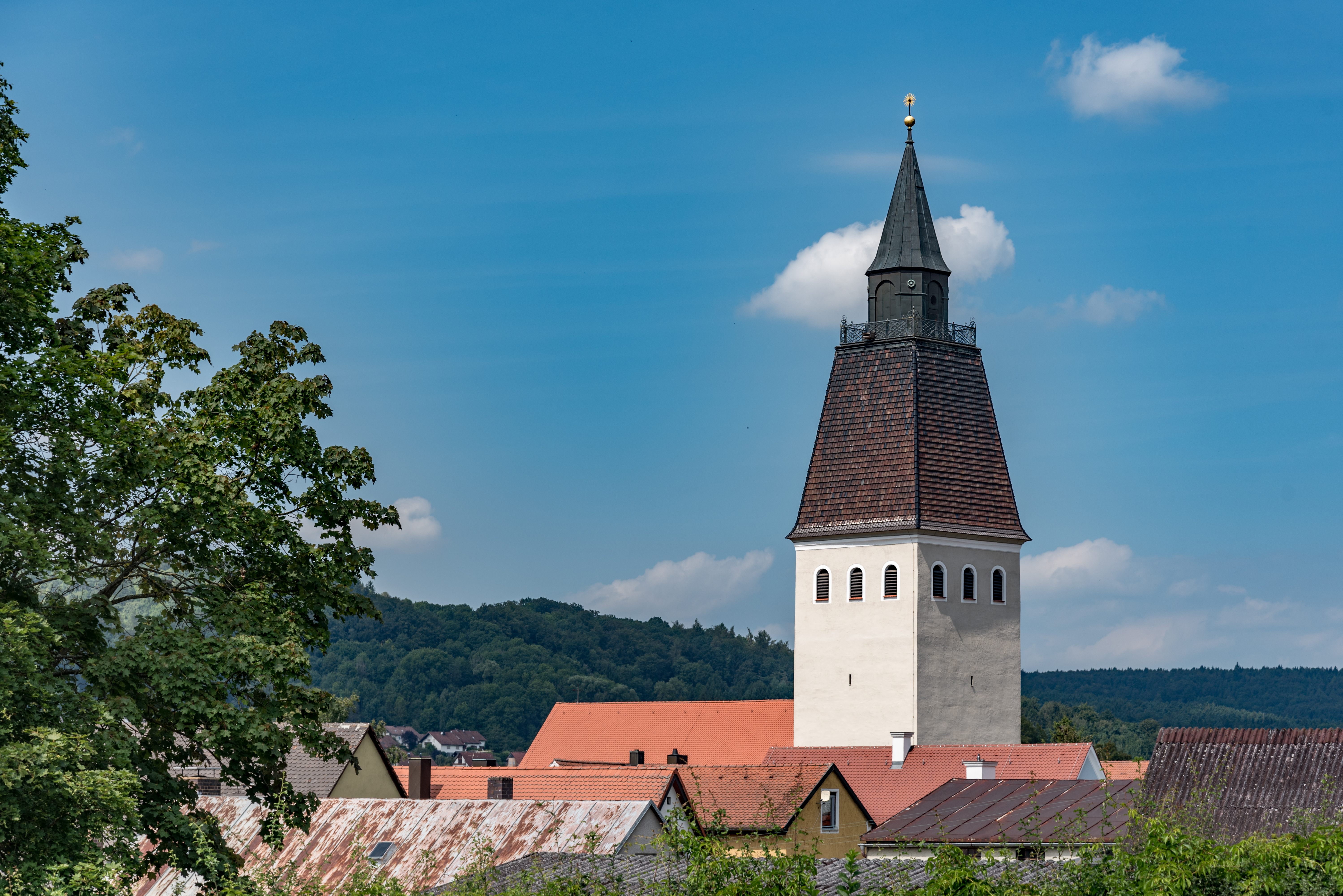 Berching, St.-Lorenz-Straße 2, Kirche St. Lorenz